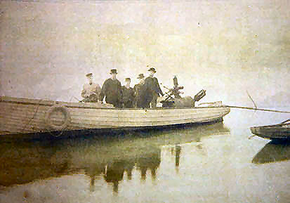 Fotografie a ambarcației cu care Alexandru Ciurcu a experimentat primul motor cu reacție în 1886. Alexandru Ciurcu este a doua persoană de la dreapta spre stânga.